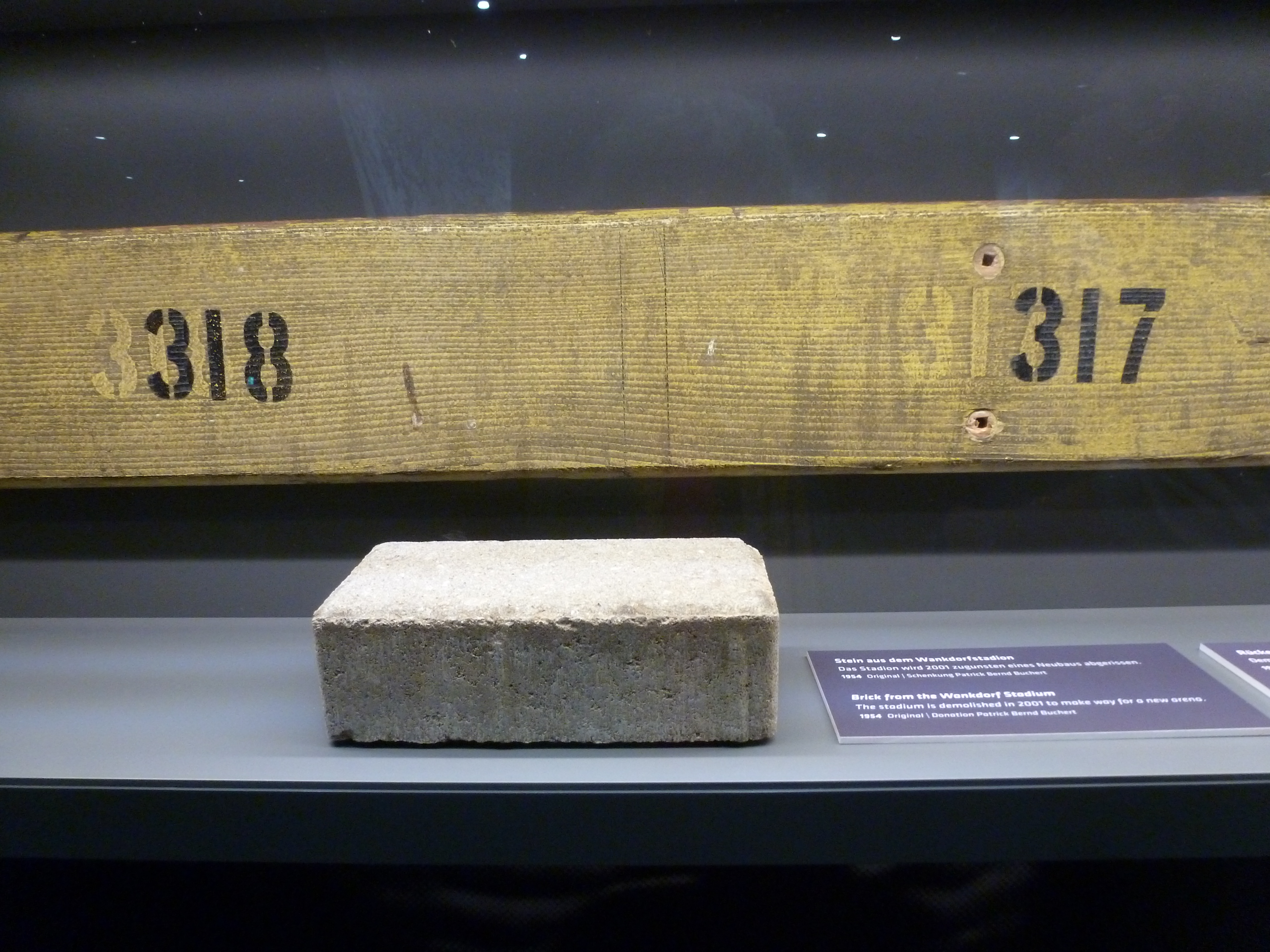 Tribünenteil und Stein aus dem Wankdorfstadion in Bern, Schweiz